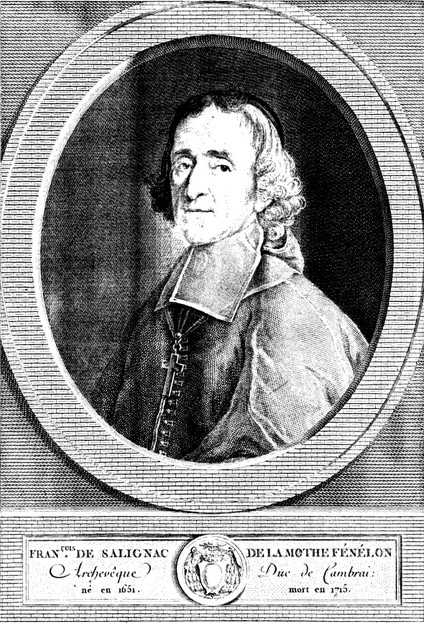 Франсуа Фенелон